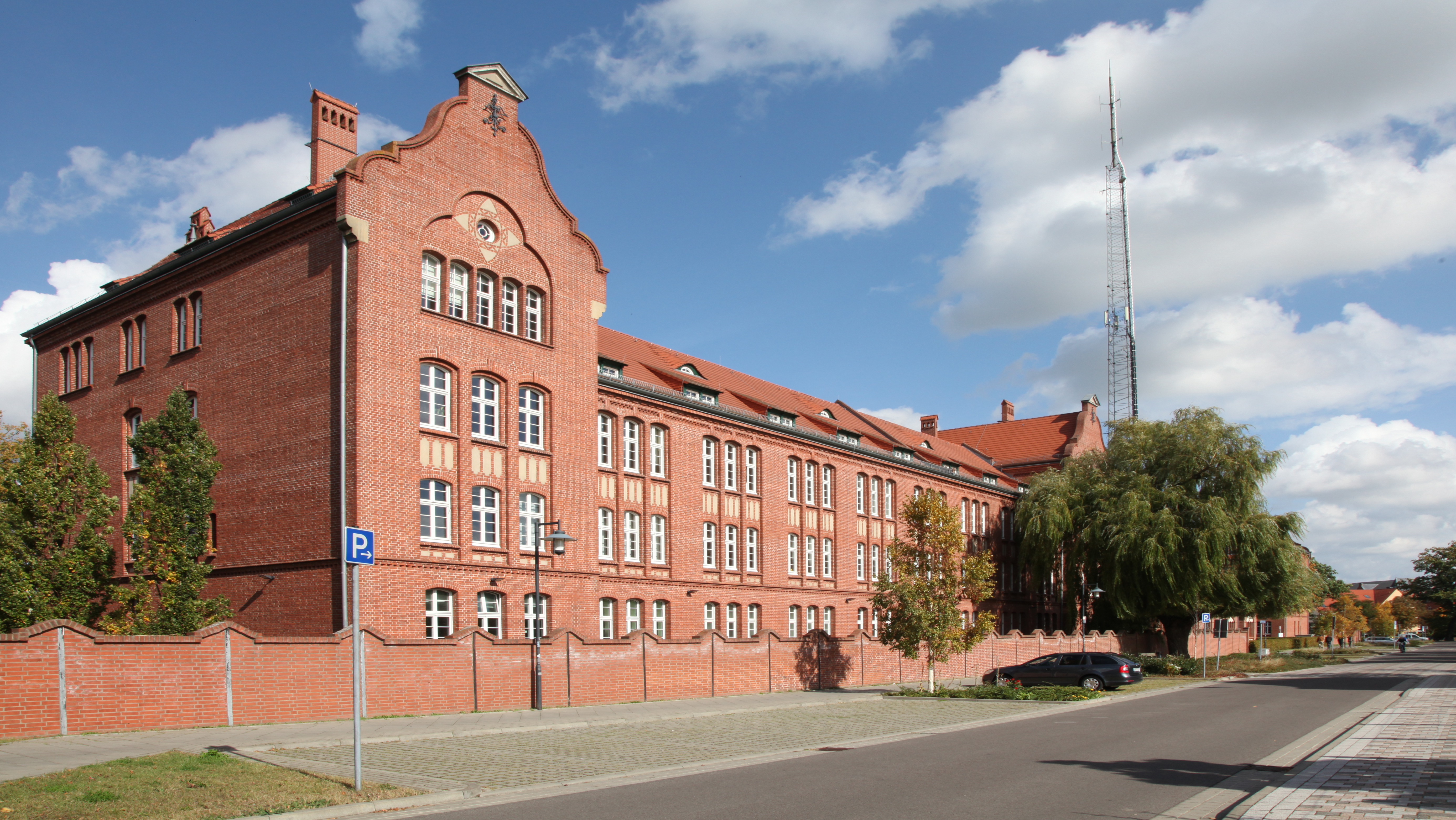 Bild entzerrt.